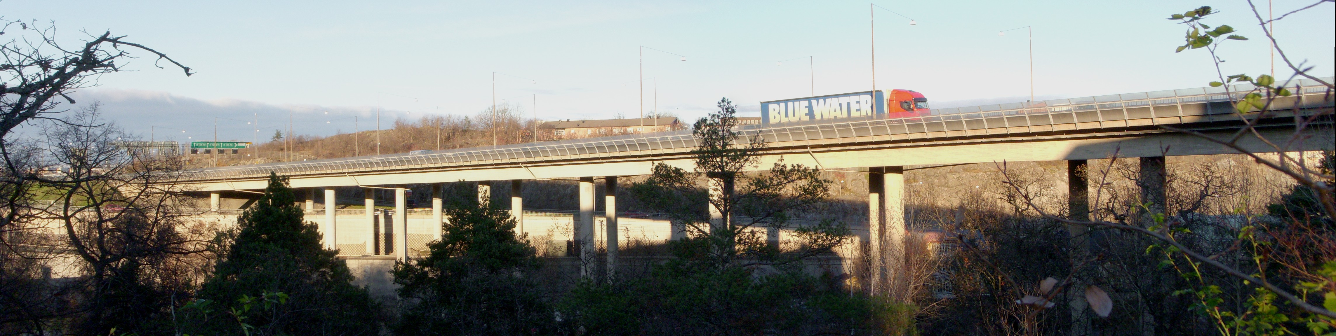 Gröndalsviadukten